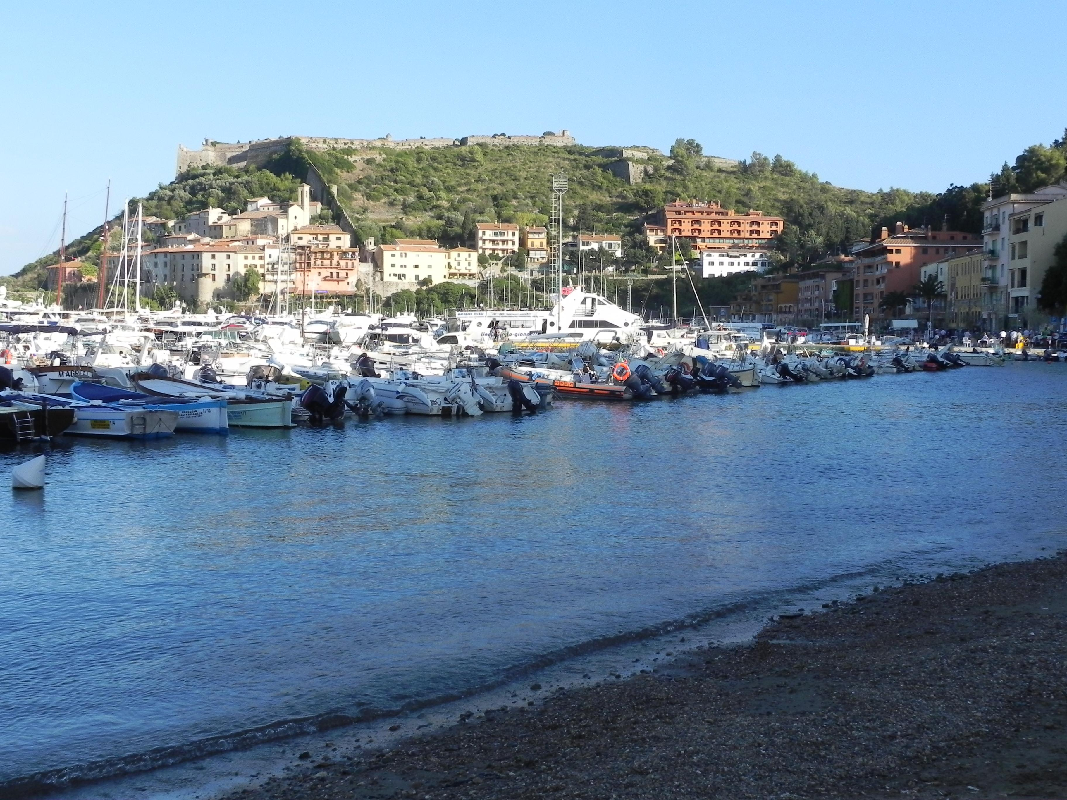 Tappeto di barche nel porto di Porto Ercole.